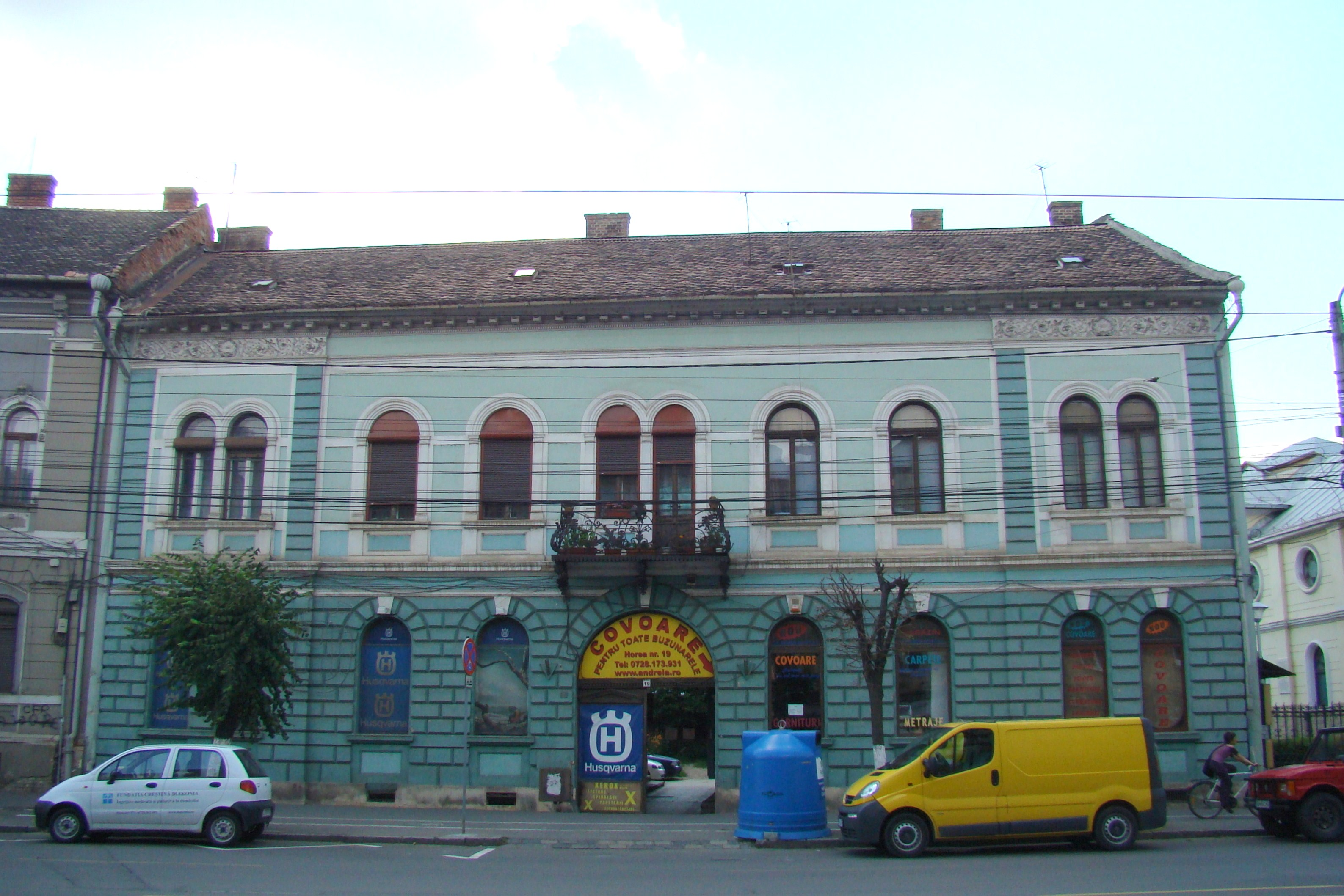 Clădire monument istoric, str. Horea, nr.19